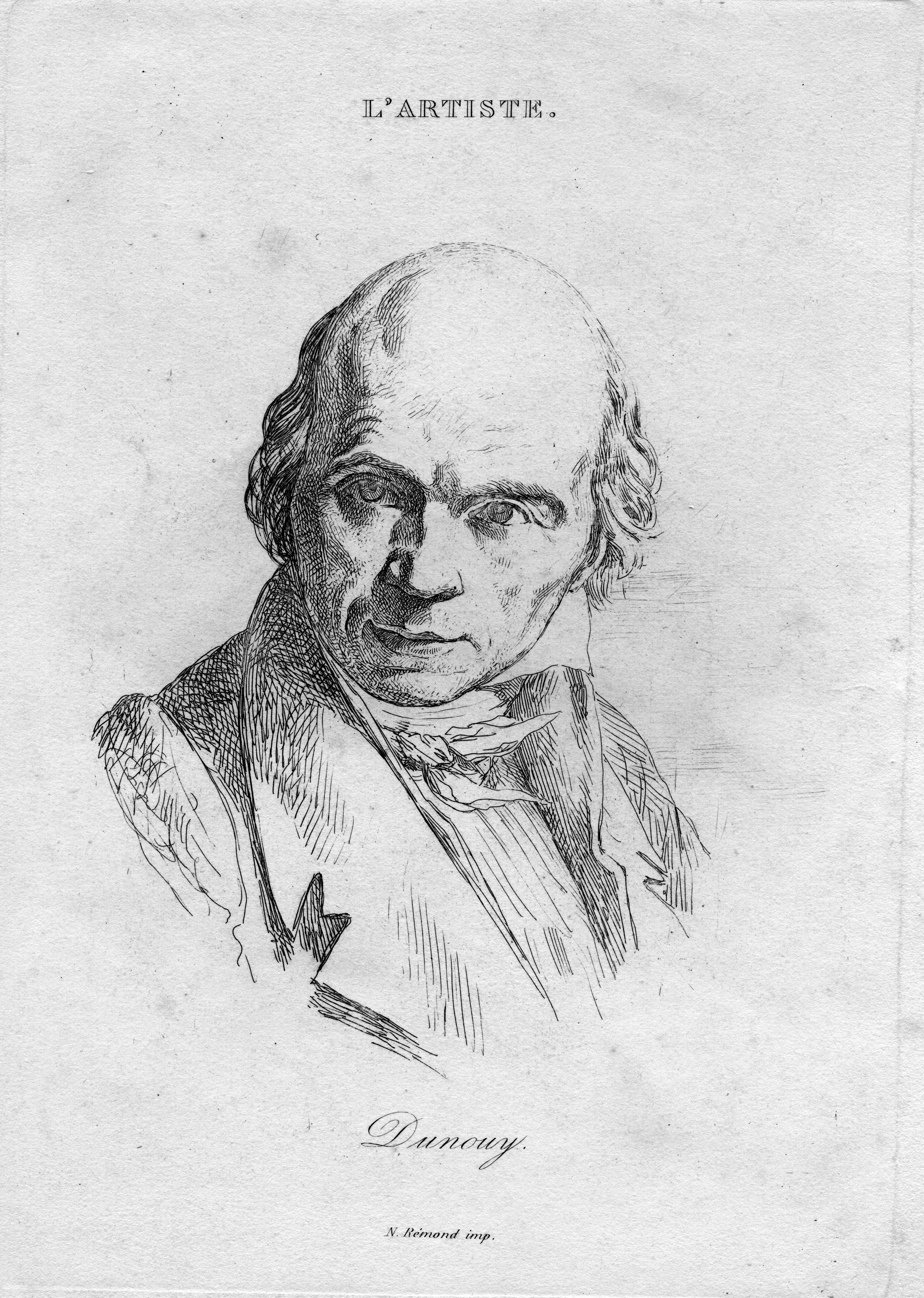 portrait gravé